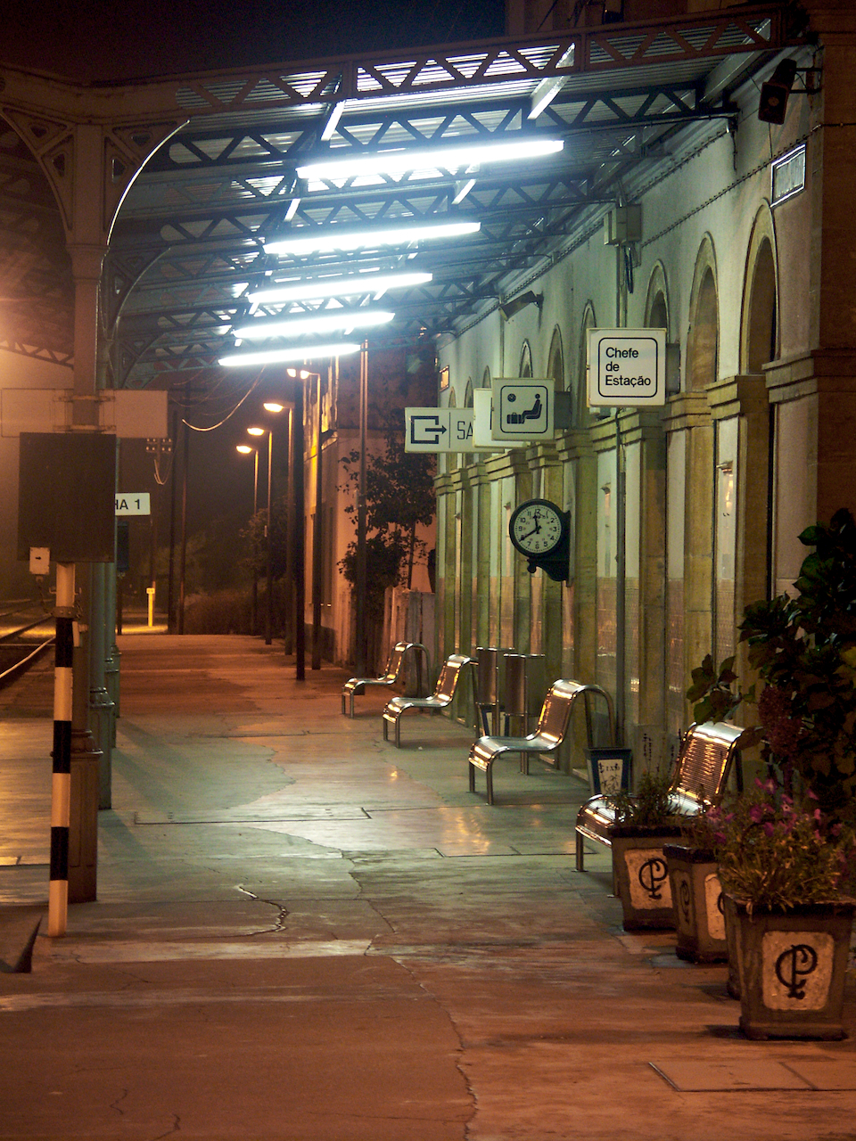 Tipo: E [Estação] Local: Torres Vedras [Linha do Oeste, PK 64] Data e hora: 20 de Setembro de 2004 [23h35] pormenor do cais de embarque.